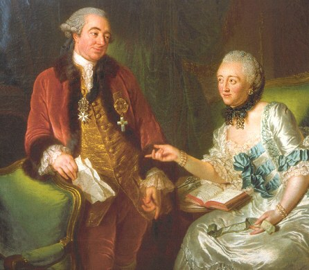 Reichsgraf Gebhard Werner von der Schulenburg-Wolfsburg und Ehefrau Sophie Charlotte von Veltheim-Harbke.